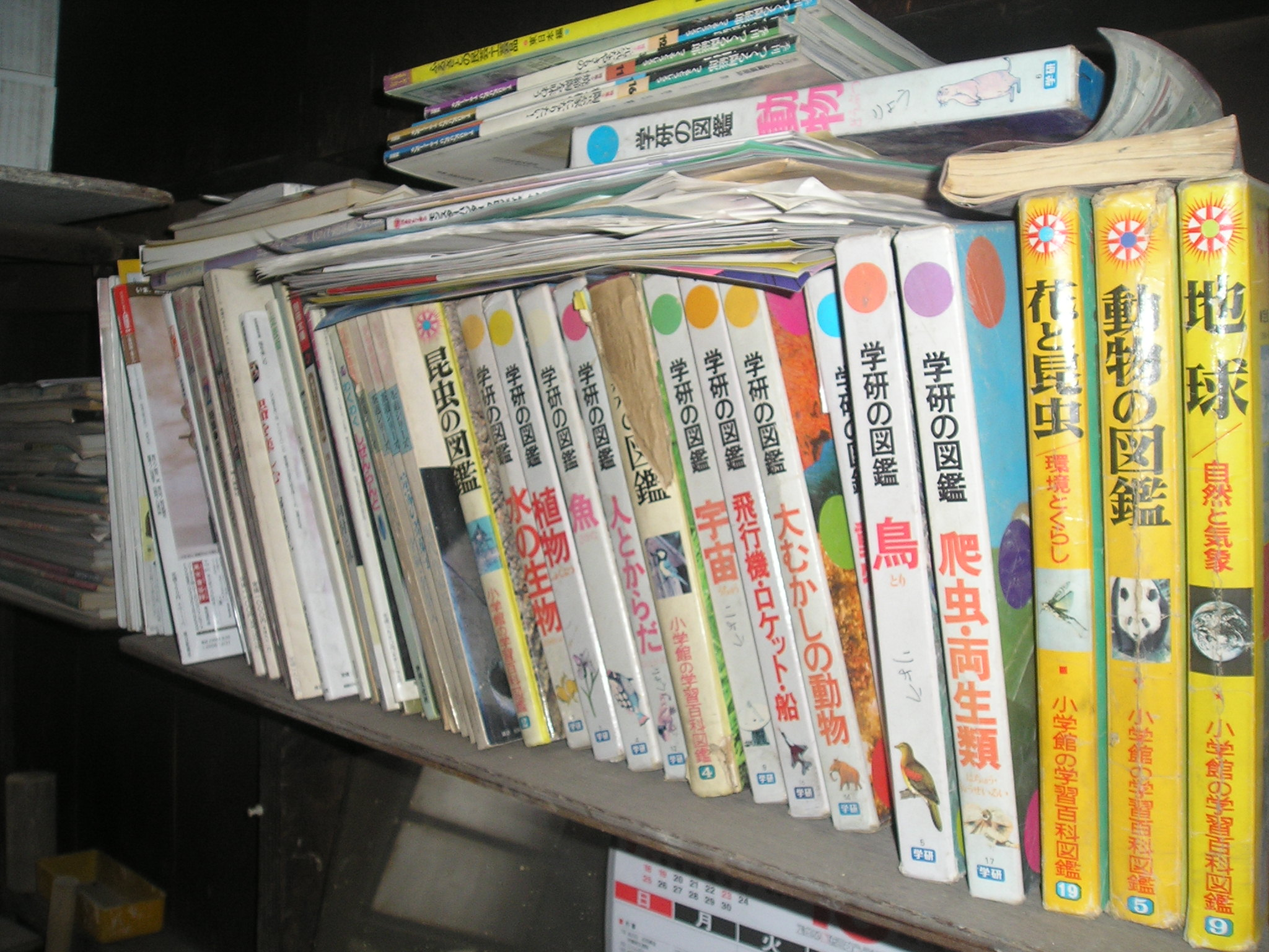 新庄東山焼 Field guide = 図鑑